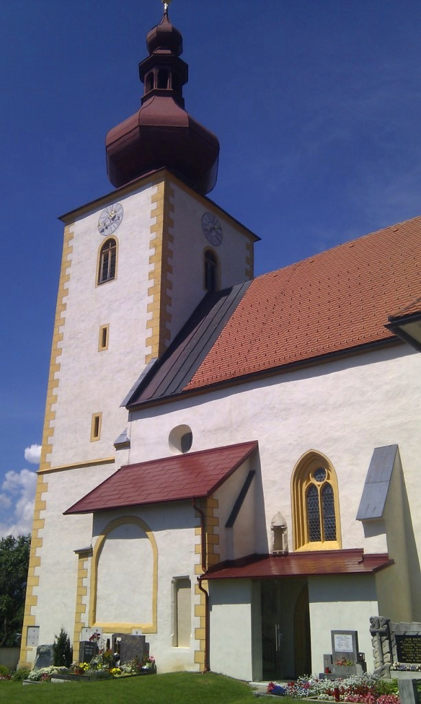 Pfarrkirche Sankt Pankrazen, Gschnaidt